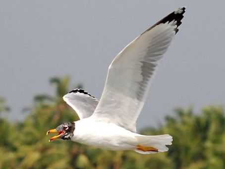 Pallas's Gull Ichthyaetus ichthyaetus adult moulting into summer plumage, Kadalundi Bird Sanctury, Malappuram, Kerala, India